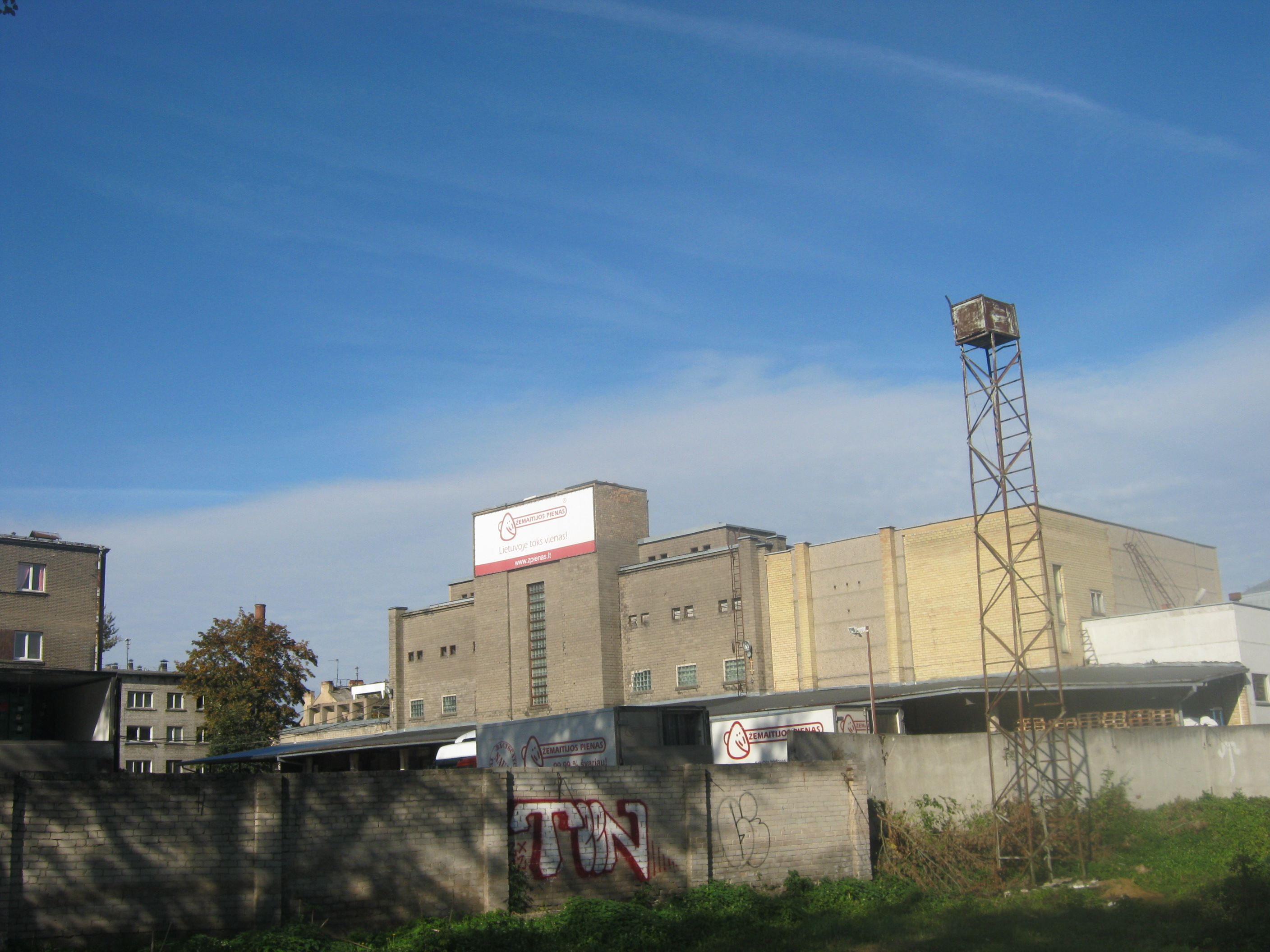 Vilnius